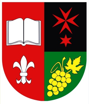 Znak Morašic.